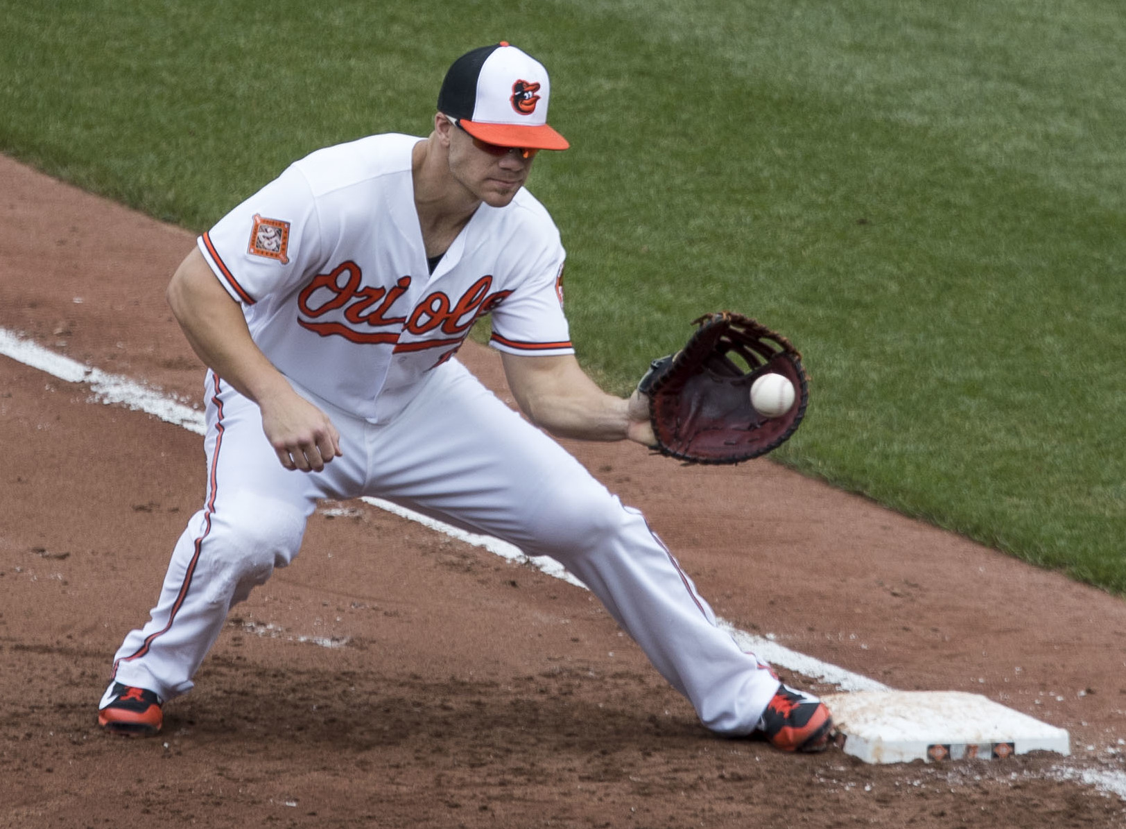 Blue Jays at Orioles 5/21/17